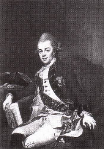 Karl II.